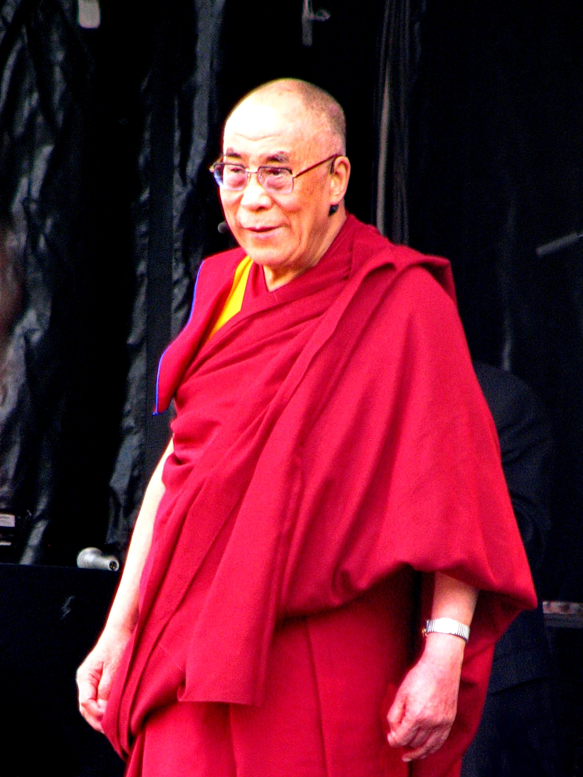 Seine Heiligkeit der 14. Dalai Lama an der Solidaritätskundgebung Die Schweiz für Tibet - Tibet für die Welt vom 10. April 2010, veranstaltet von der Gesellschaft Schweizerisch-Tibetische Freundschaft (GSTF) auf dem Münsterhof in Zürich.